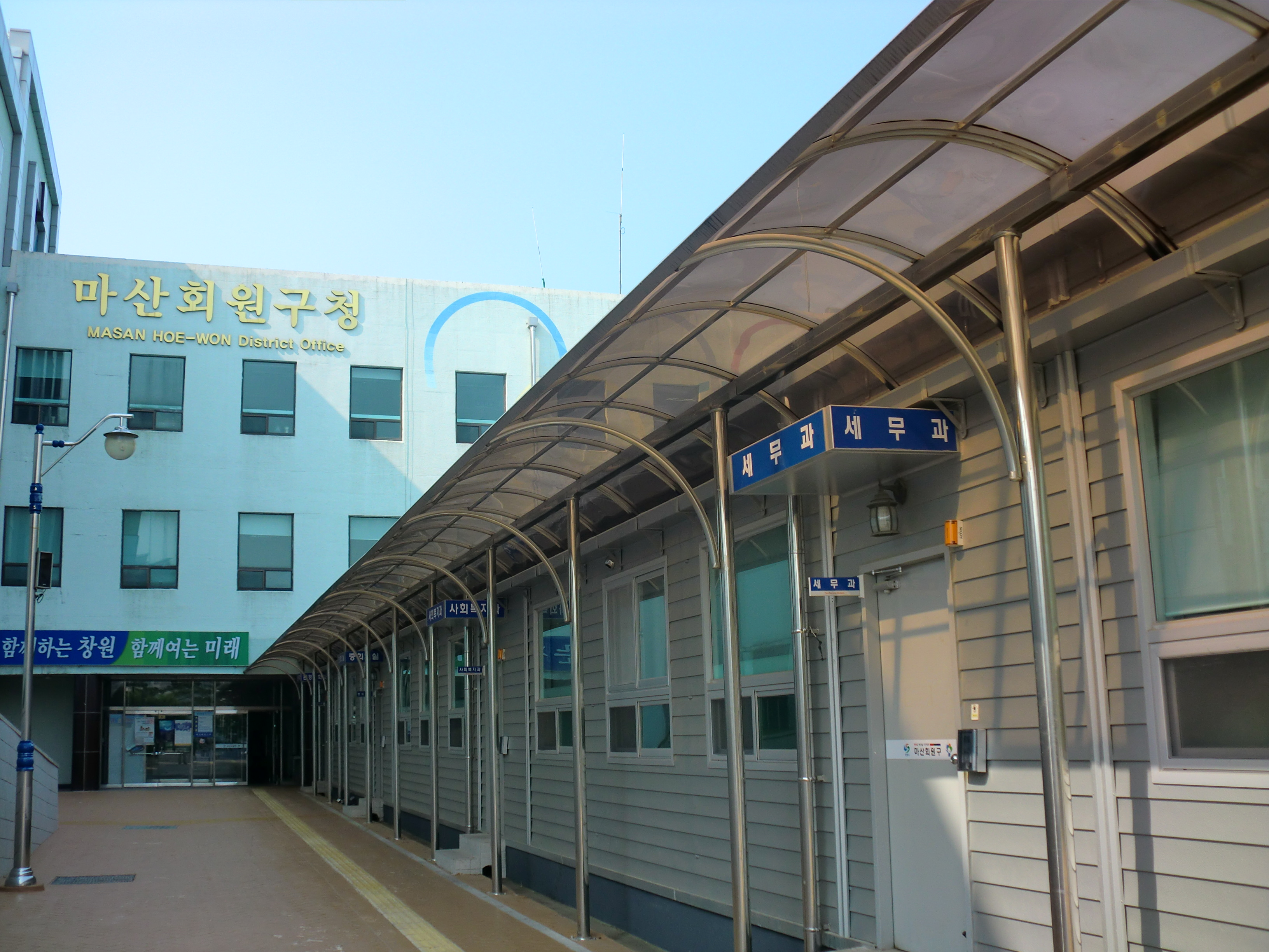 경상남도 창원시 마산회원구에 있는 마산회원구청